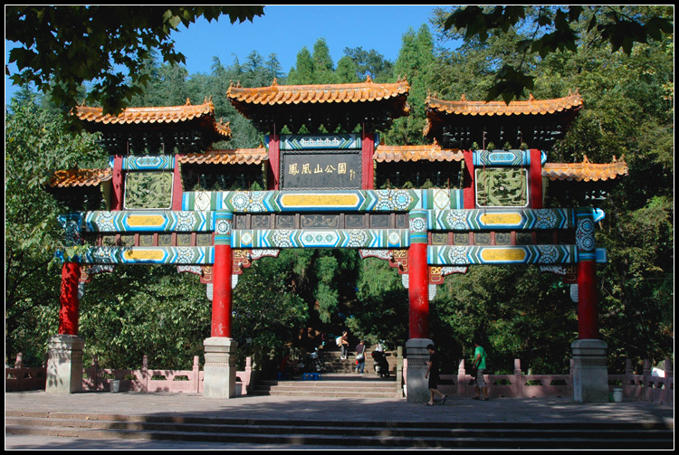 Honghuagang, Zunyi, Guizhou, China